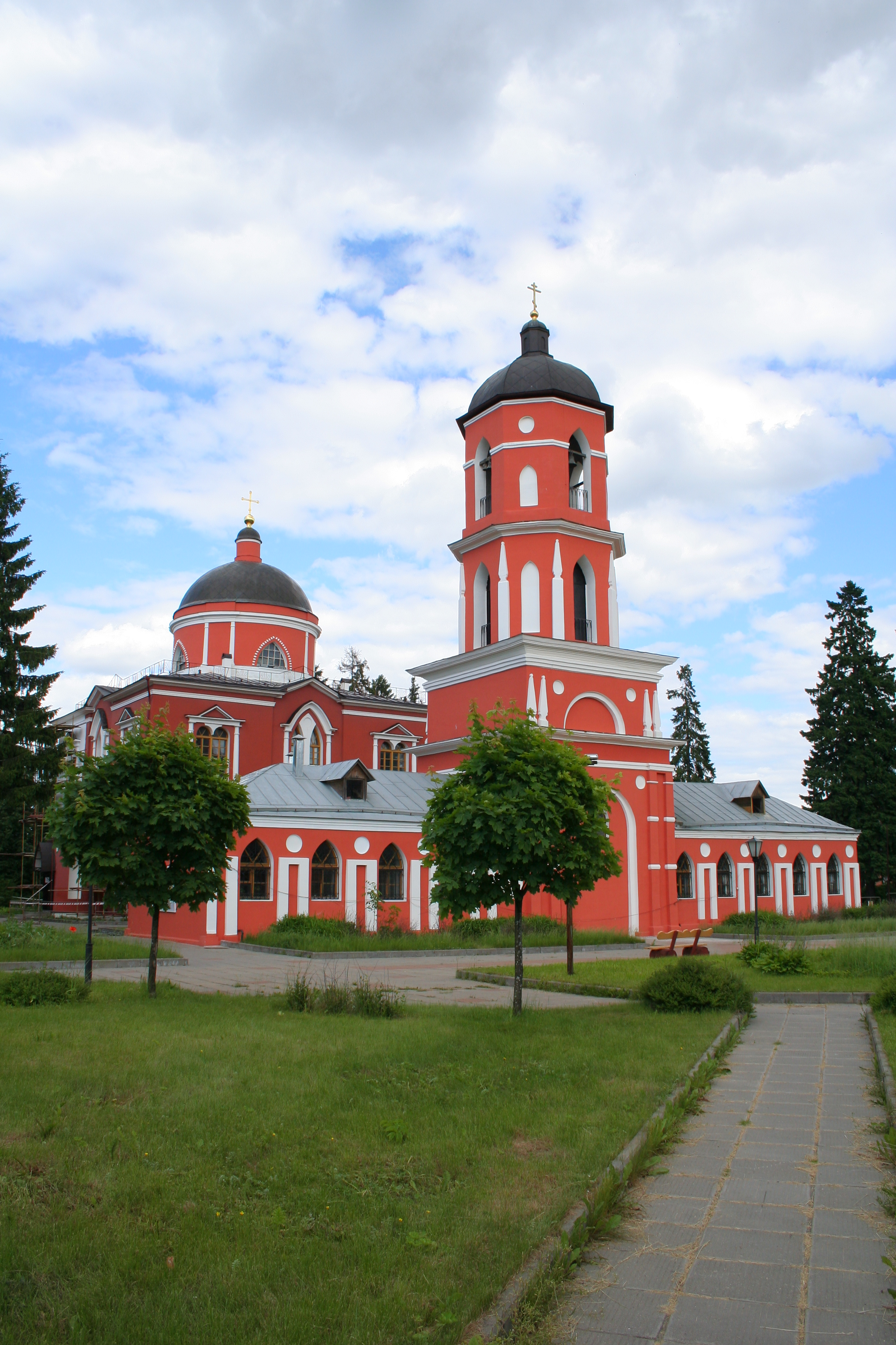 Kirche des Hl. Nikolaus zu Rschawki (Selenograd), Moskau.